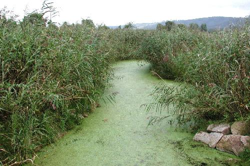 Nährstoffreiche, langsam fließende Gewässer sind bevorzugte Lebensräume von Grünfröschen.